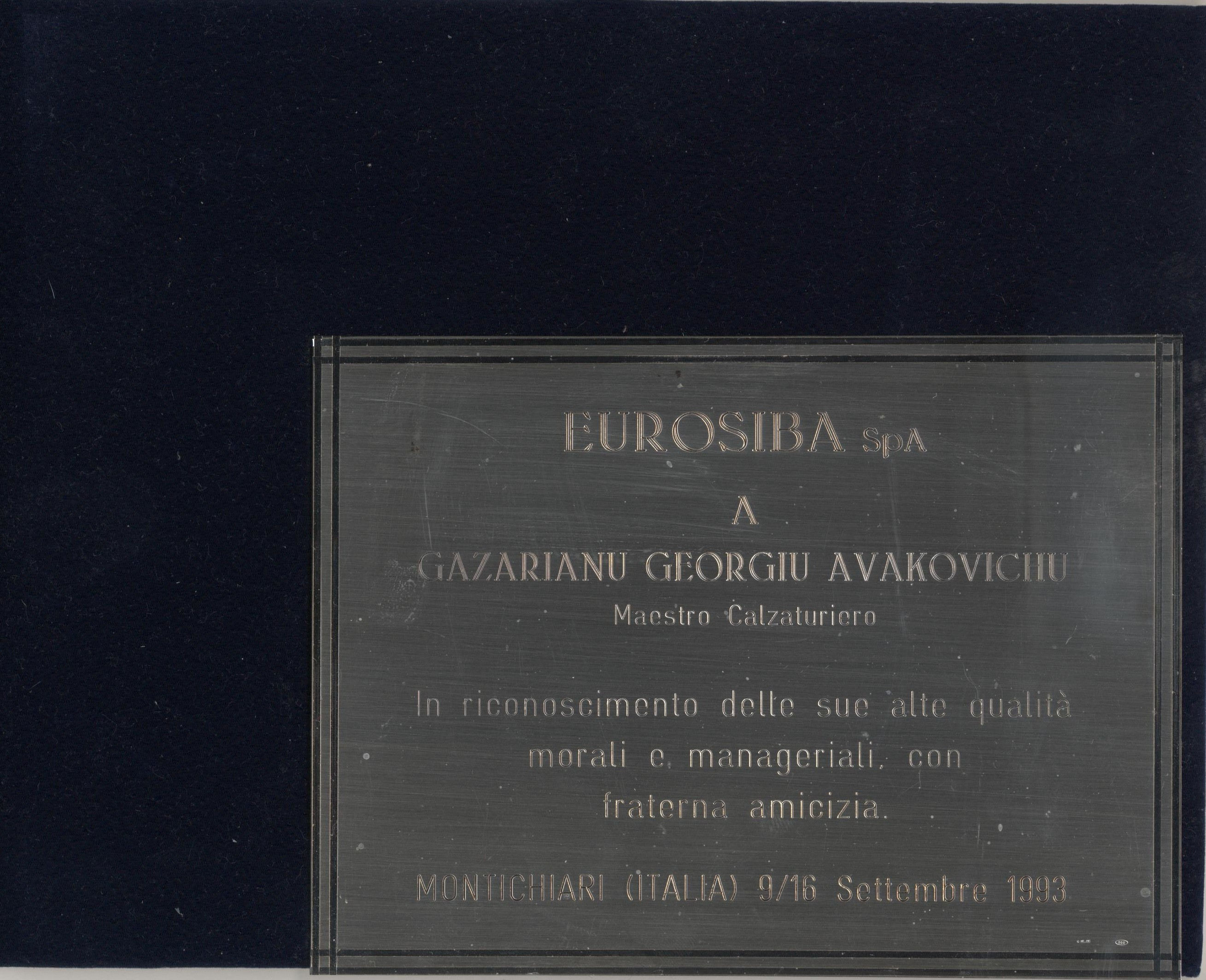 Звание «Маэстро»